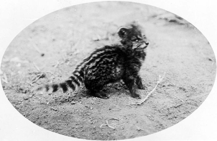 Repronegatief. Civetkat (Viverricula malaccensis), Zuid-Java = Viverricula indica muriavensis